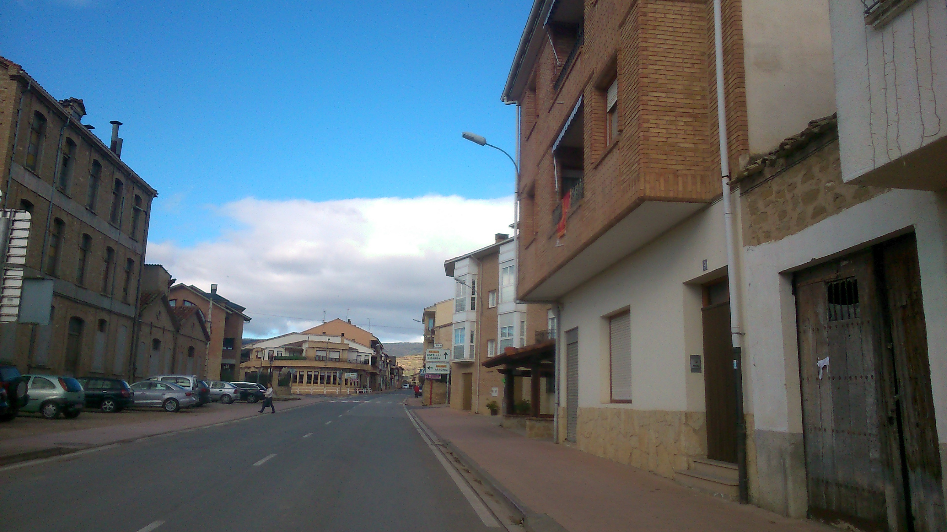 Allo, Navarra